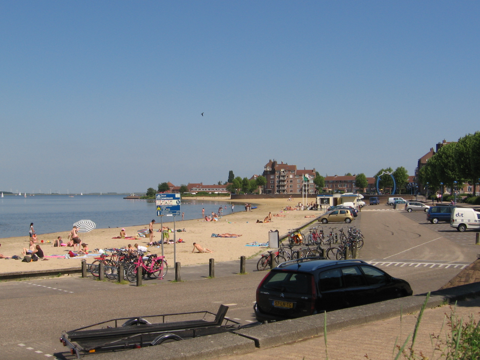 Huizen, strandje aan gooimeer, juni 2006